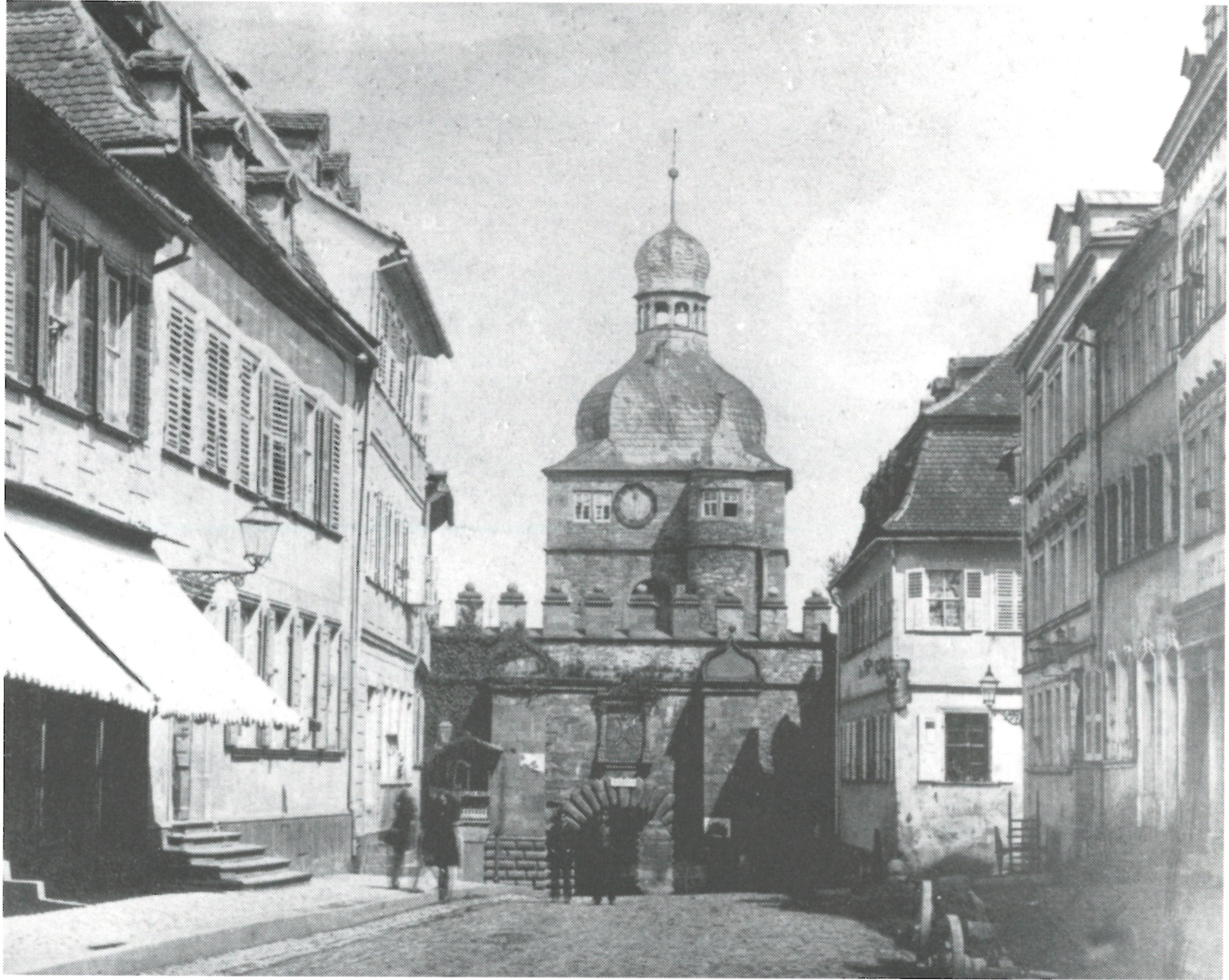 Schweinfurt: Mühltor von der Stadtseite aus. Aufgenommen vor 1876.